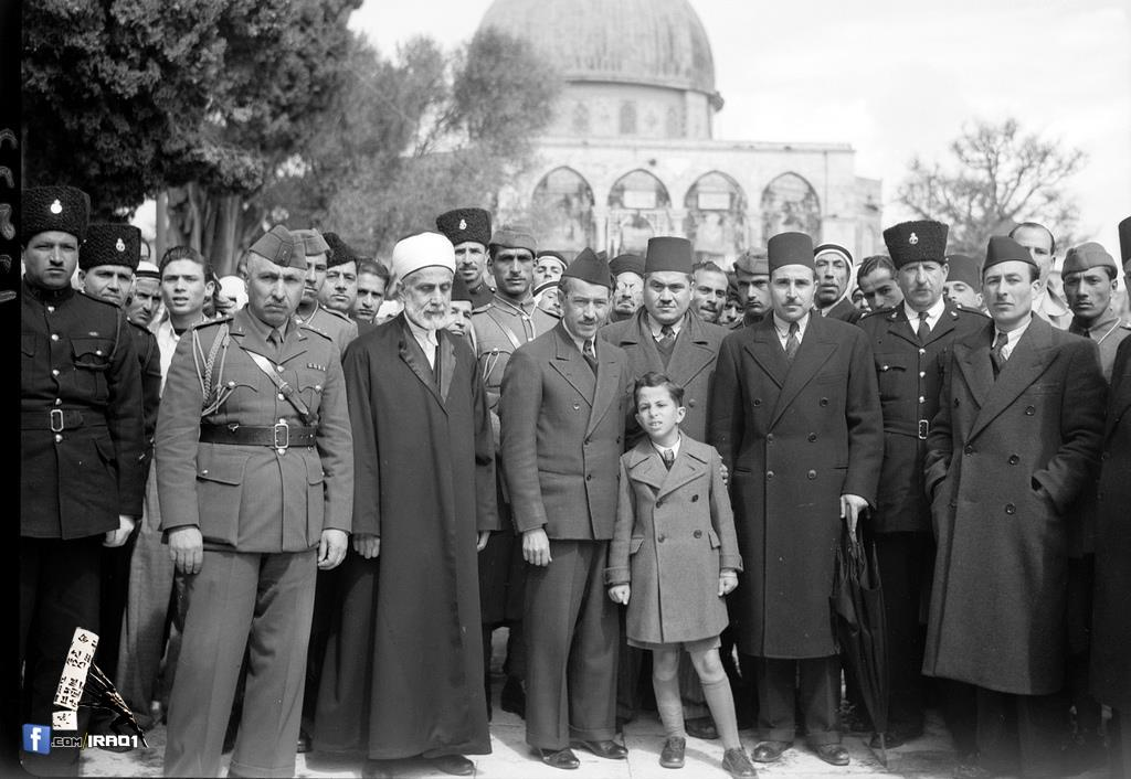 صورة لمقالة الملك فيصل في موقع جرايد